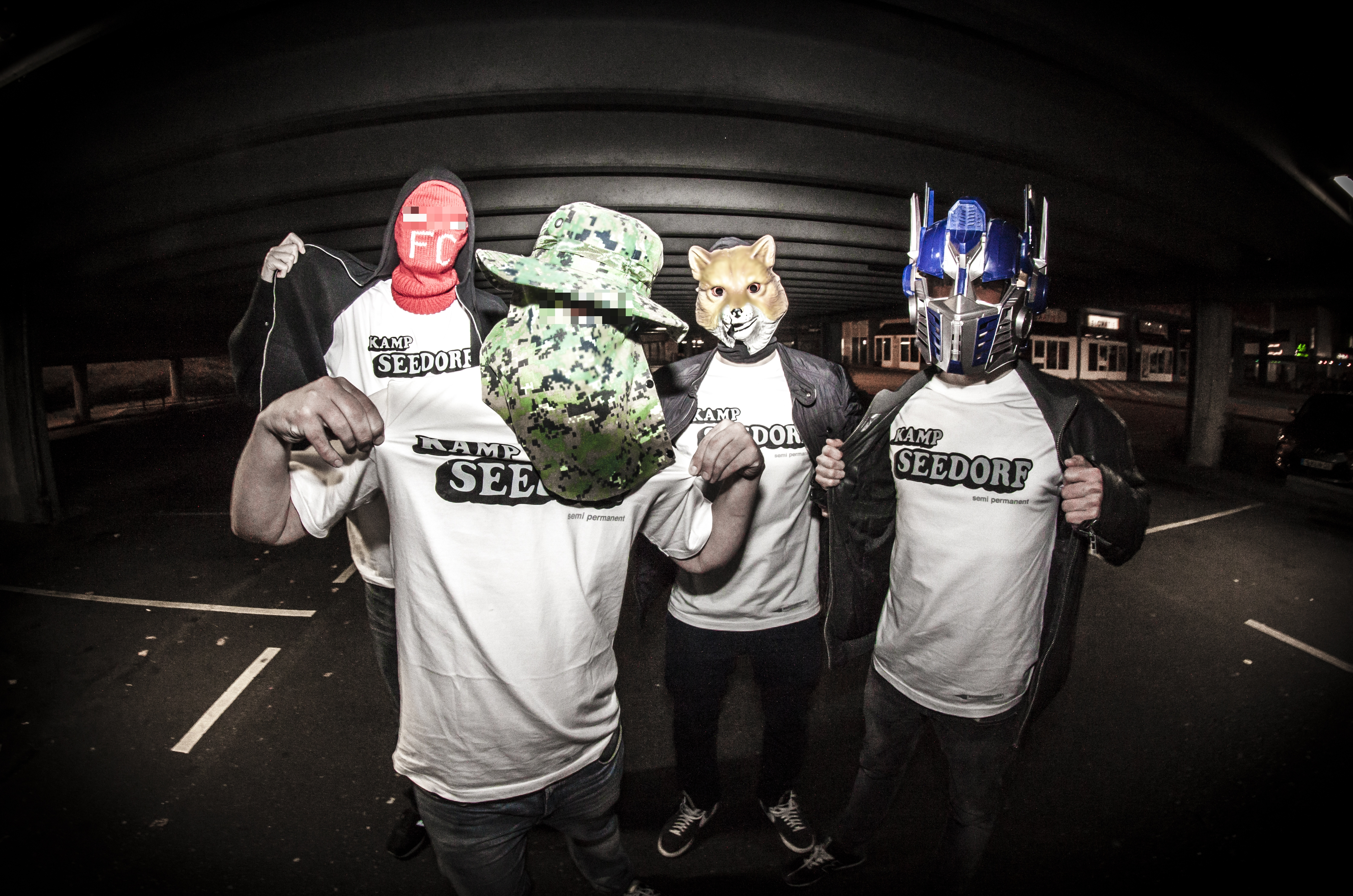 Leden van Kamp Seedorf (onherkenbaar)